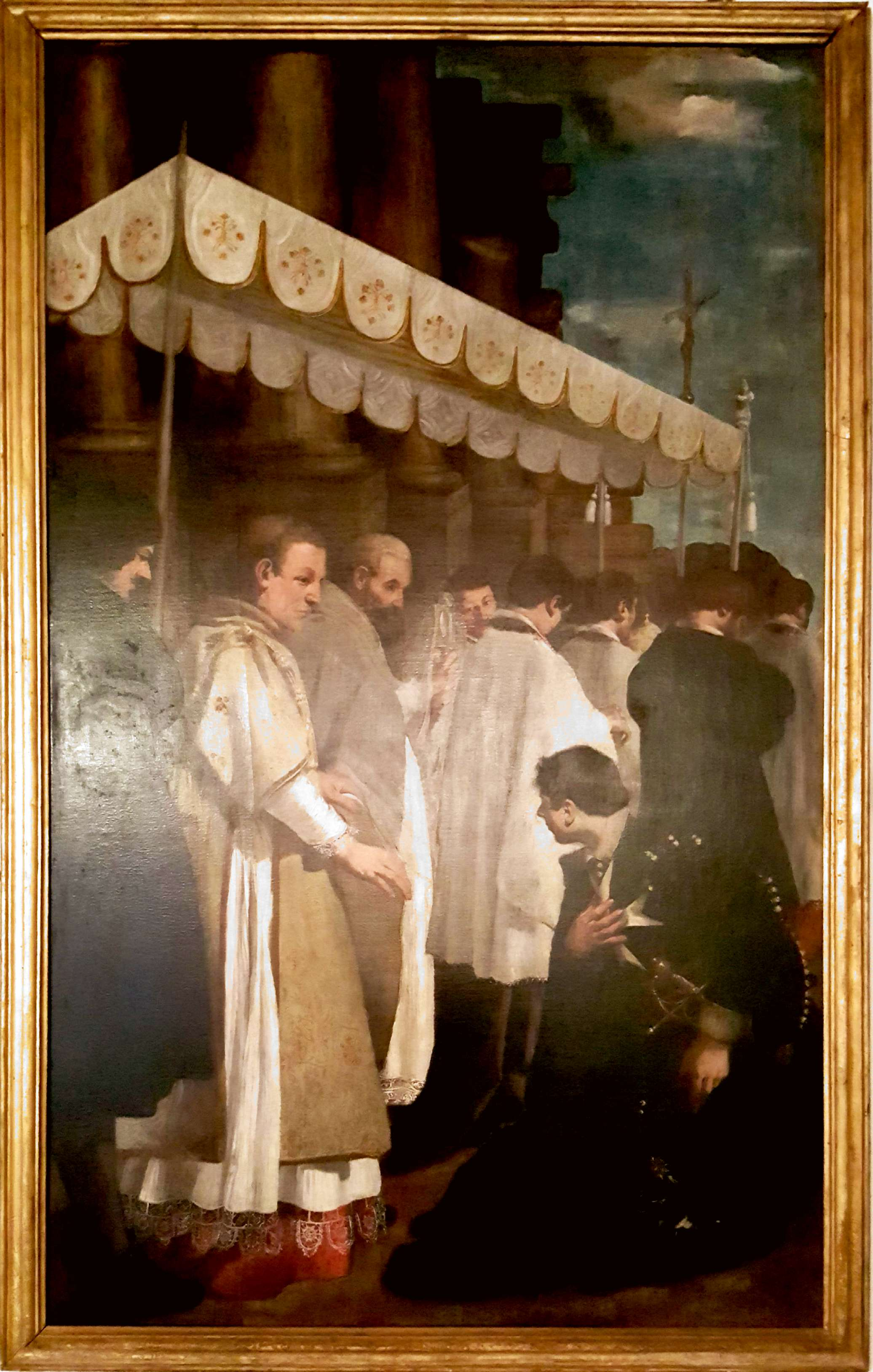 Museo di Saludecio e del Beato Amato This is a photo of a monument which is part of cultural heritage of Italy.